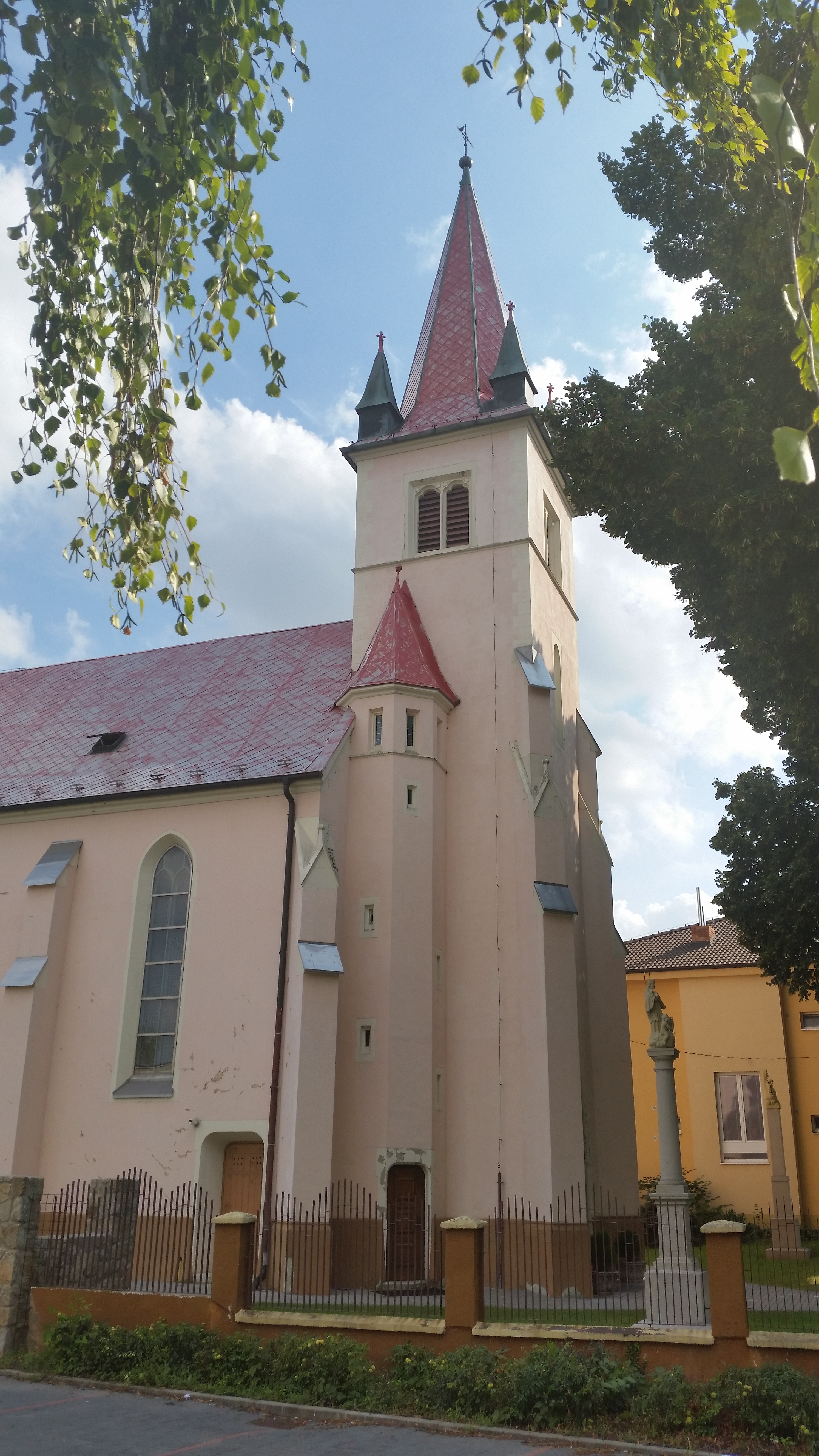 Kostol v Zavare